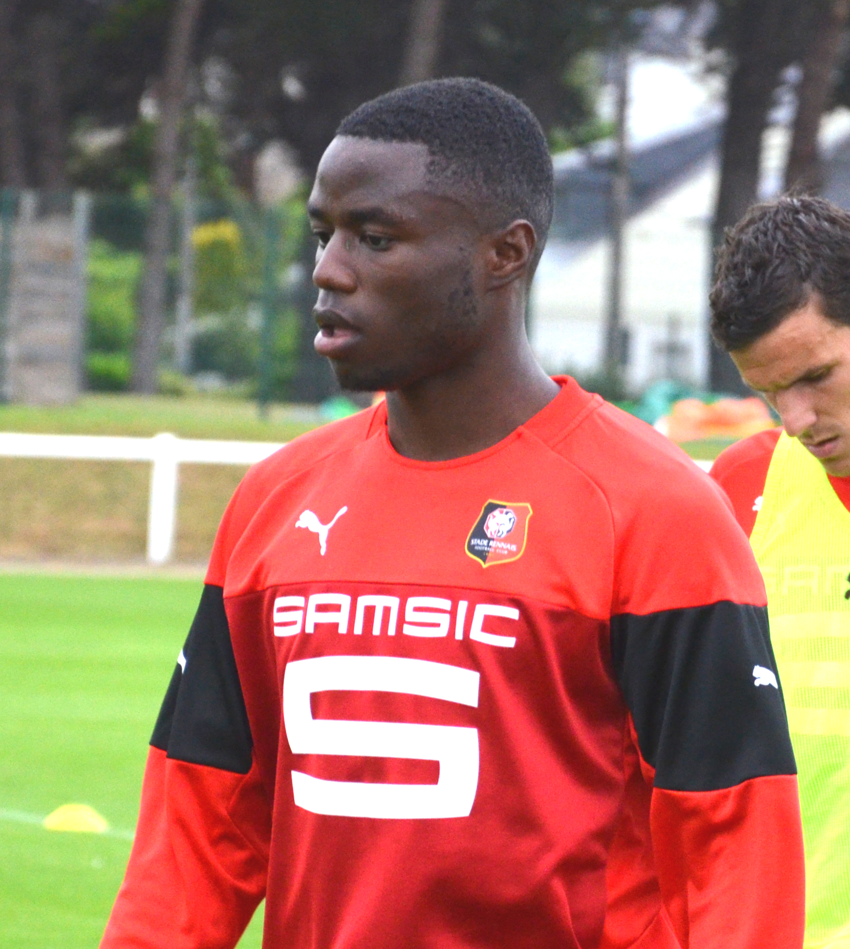 Photo prise lors de l'échauffement des joueurs du Stade rennais avant un match amical face à l'US Orléans au stade Paul-Audrin de Dinard. Ici, Paul-Georges Ntep.